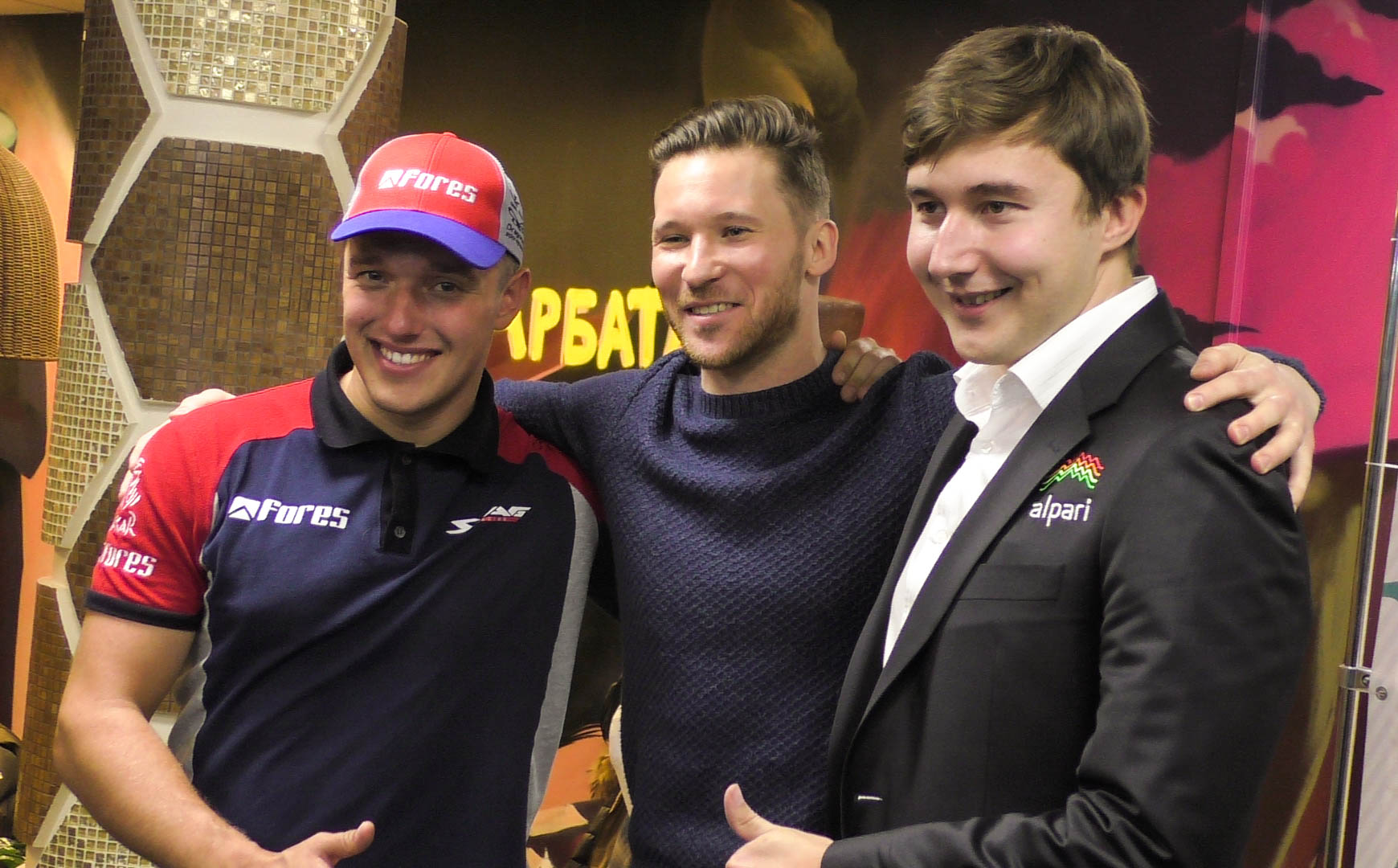 02.02.2017. Три чемпиона мира, три Сергея Карякина в Московском Доме Книги.